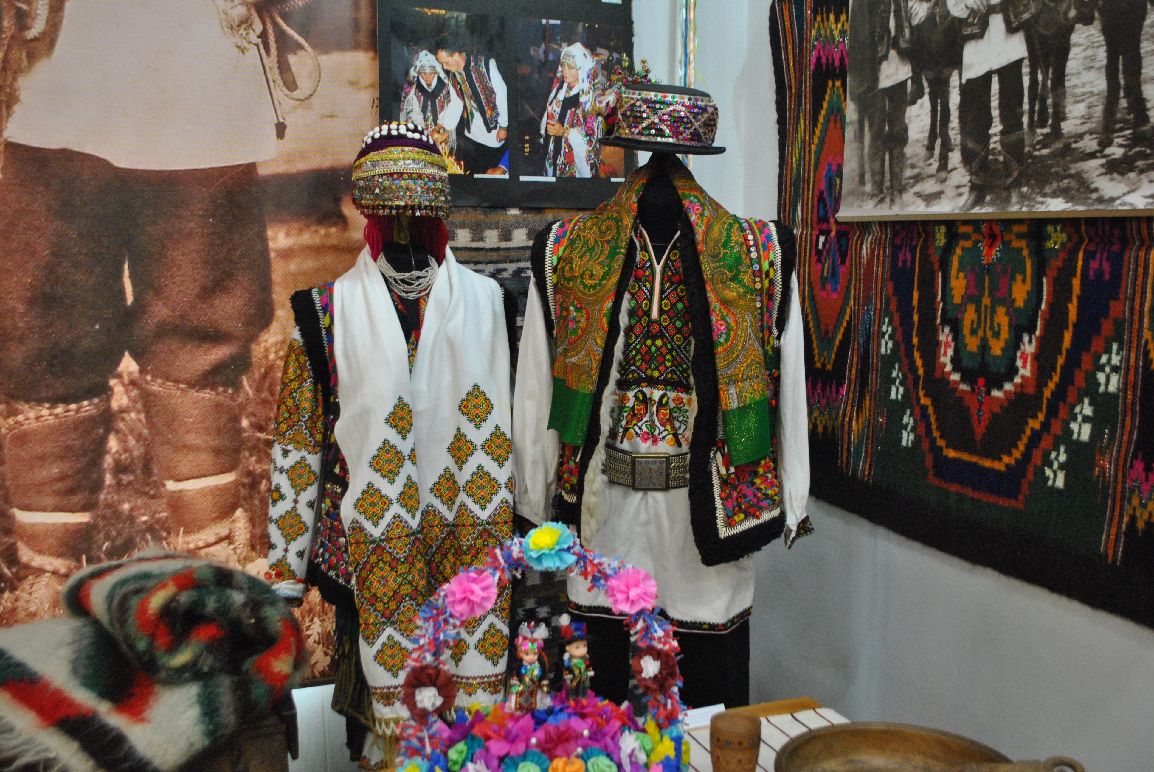 Весільний одяг 1997 рік с.Красноїлля